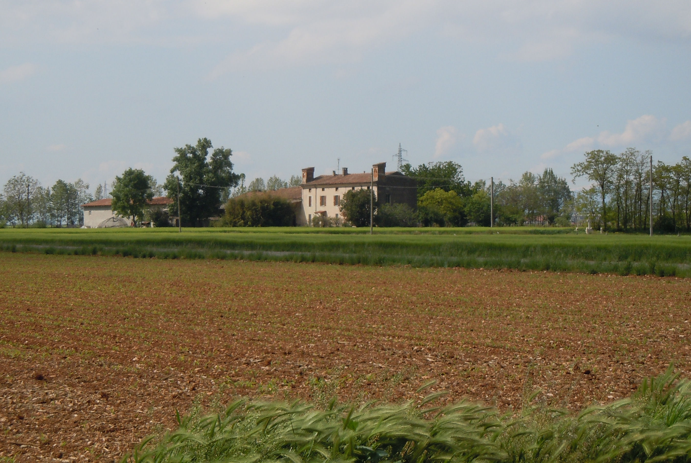 Rebecco, località Casa Nuova (o Ca' Nova).